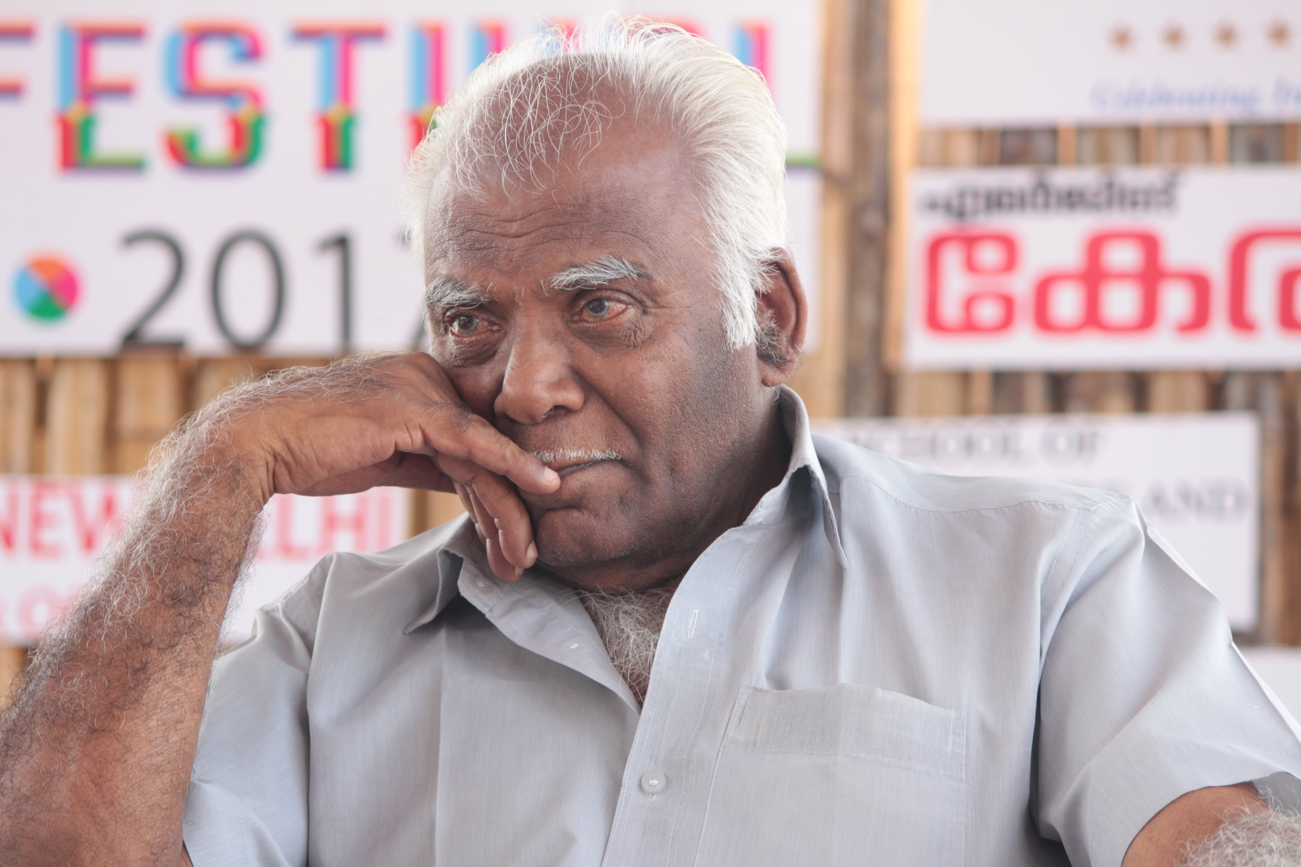 ചരിത്രകാരന്‍